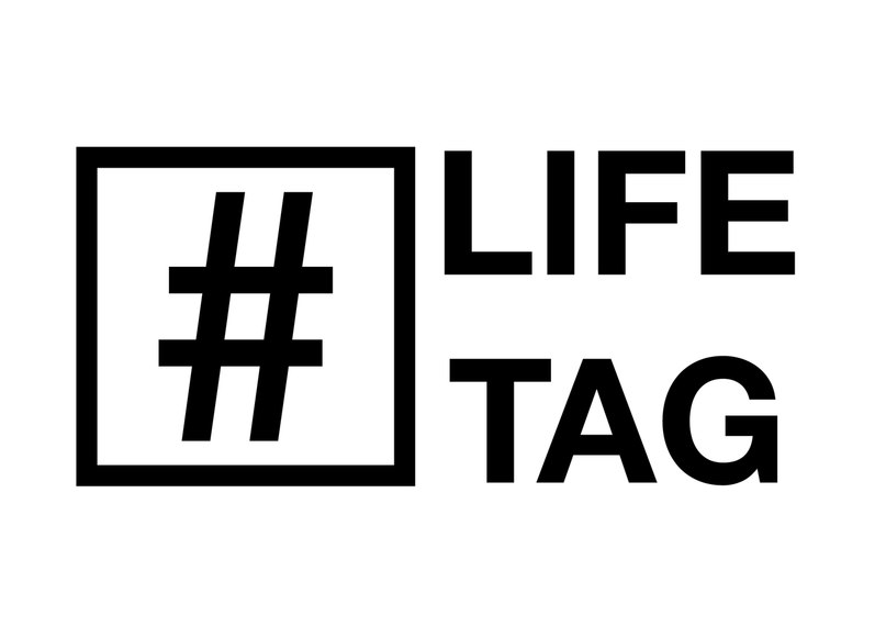 логотип проекту #Life tag